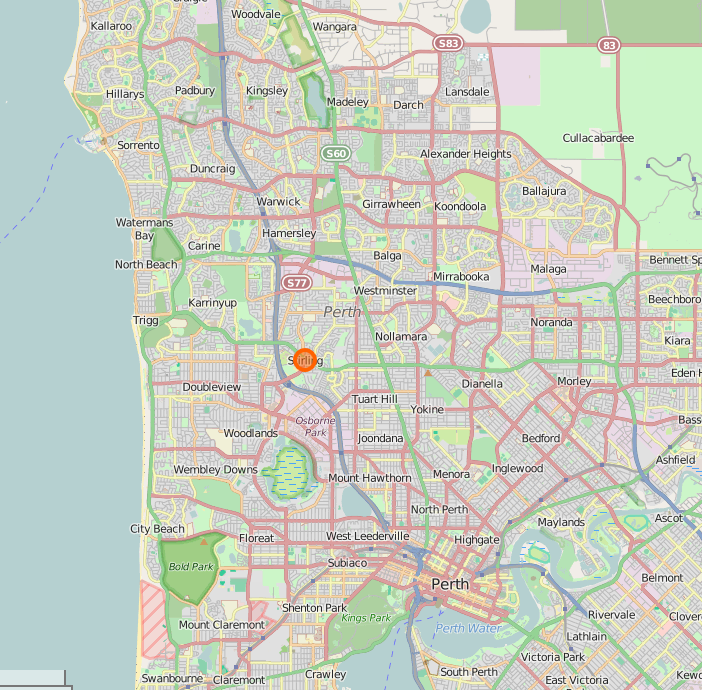 Stirling, Pert Australia